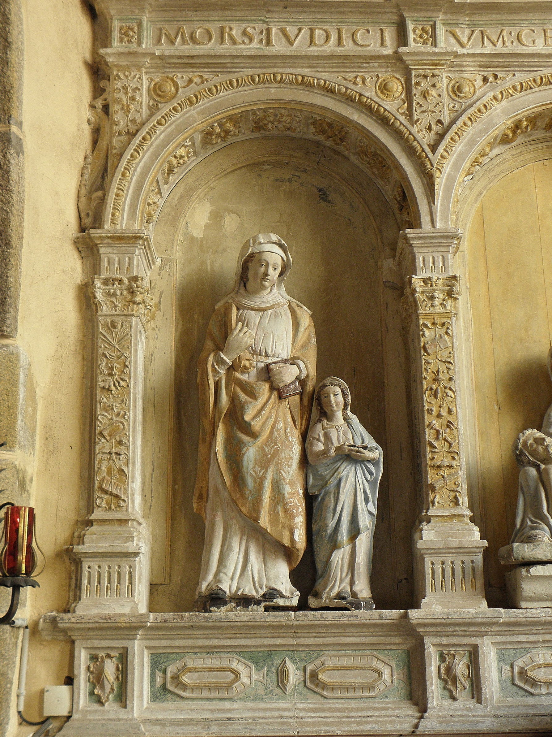 Retable de Saint-Eustache en l'église d'Hambers (53). Groupe sculpté de l'éducation de la Vierge par Sainte-Anne.